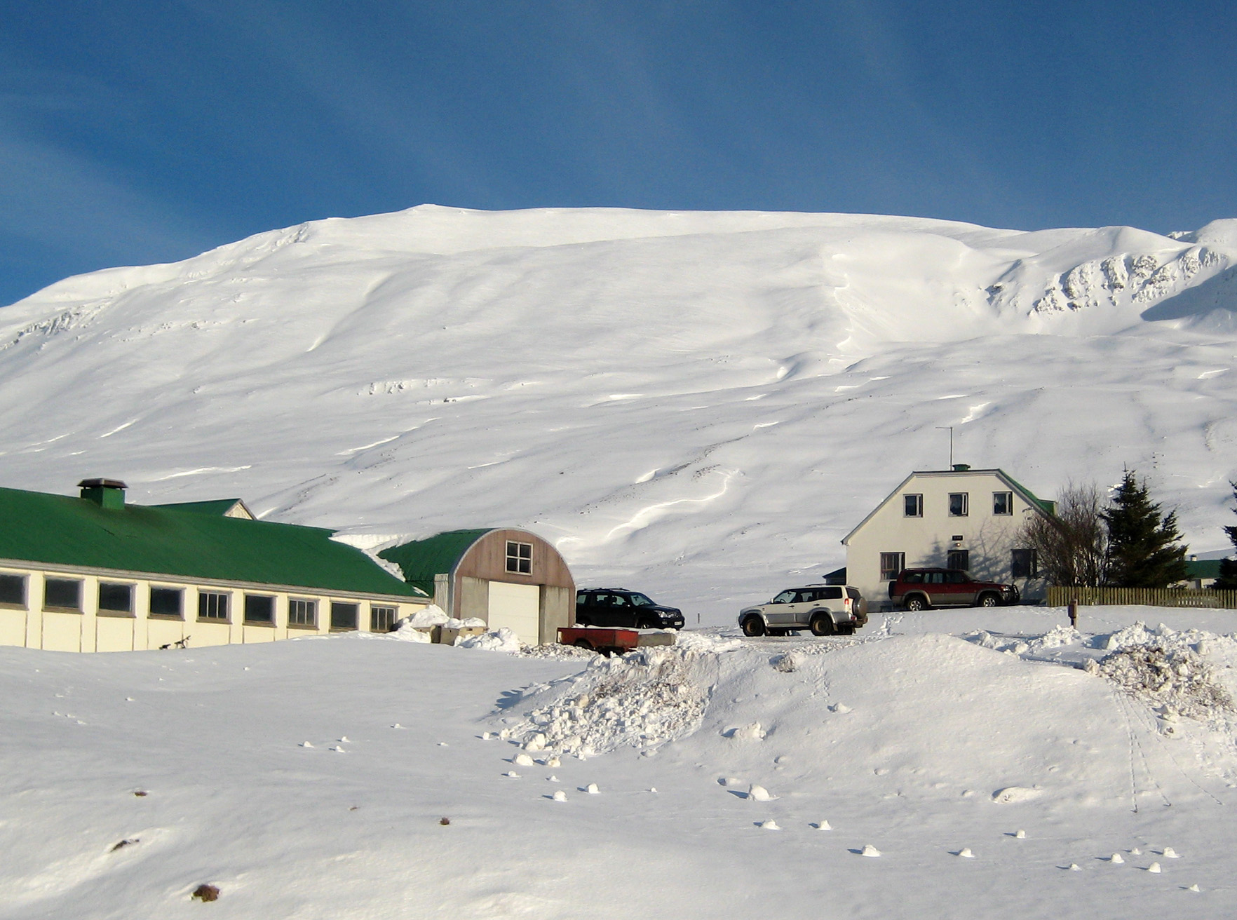 Hof í Svarfaðardal, N-Iceland